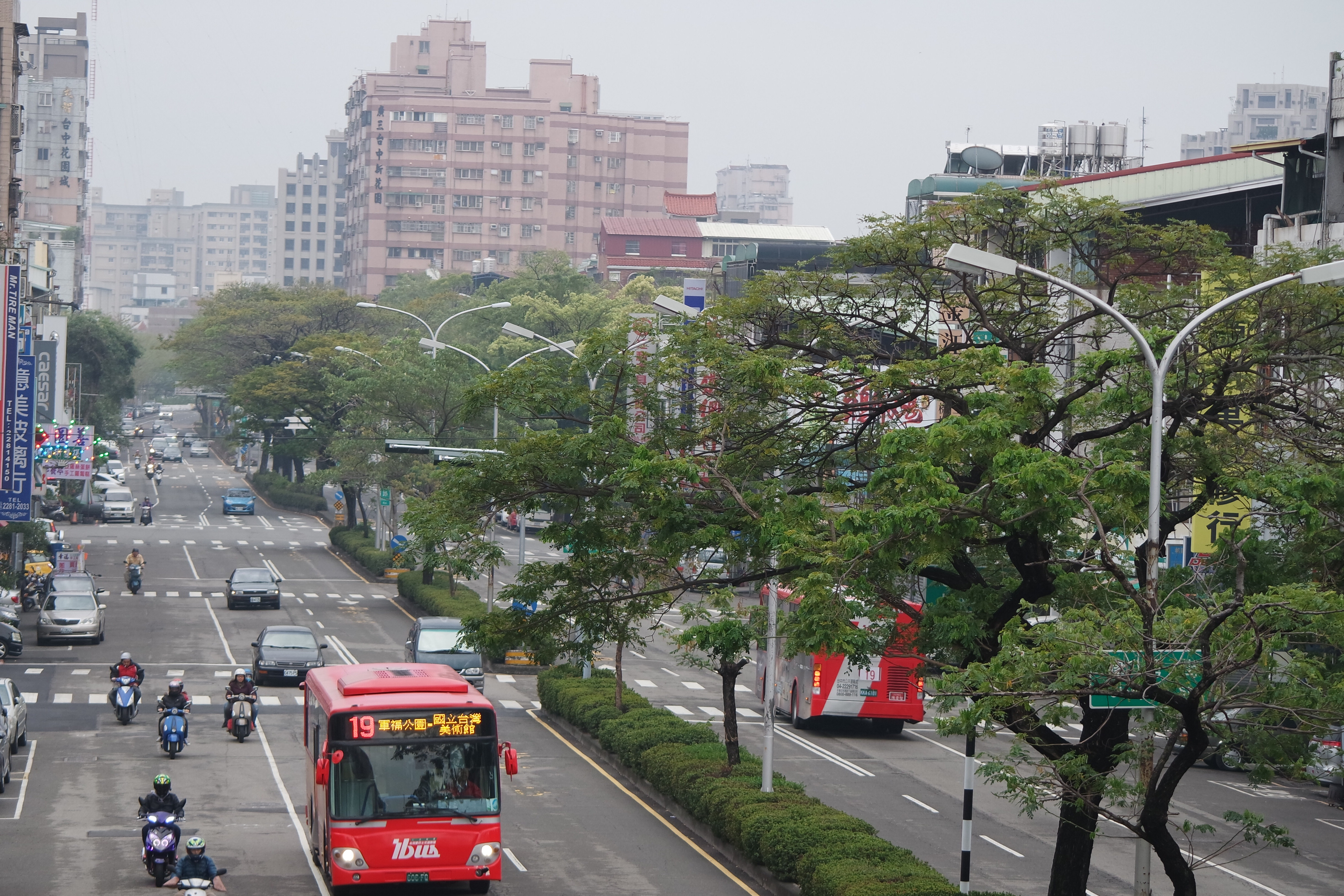 仁友客運19路復活誕辰紀念!